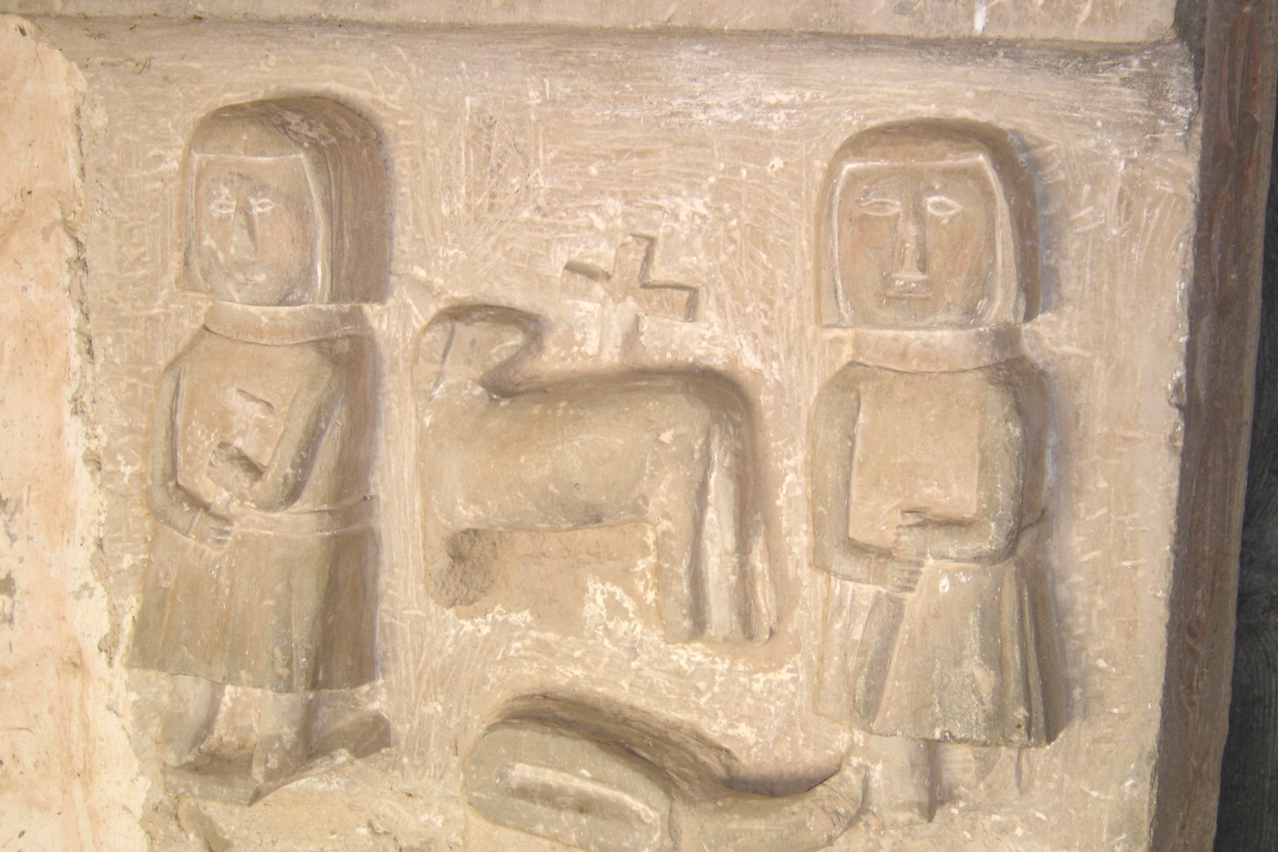 L'ermita de Sant Lleïr de Casabella, al municipi de La Coma i la Pedra, a la Vall de Lord (Solsonès). El grup escultòric de l'esquerra de la poertalada